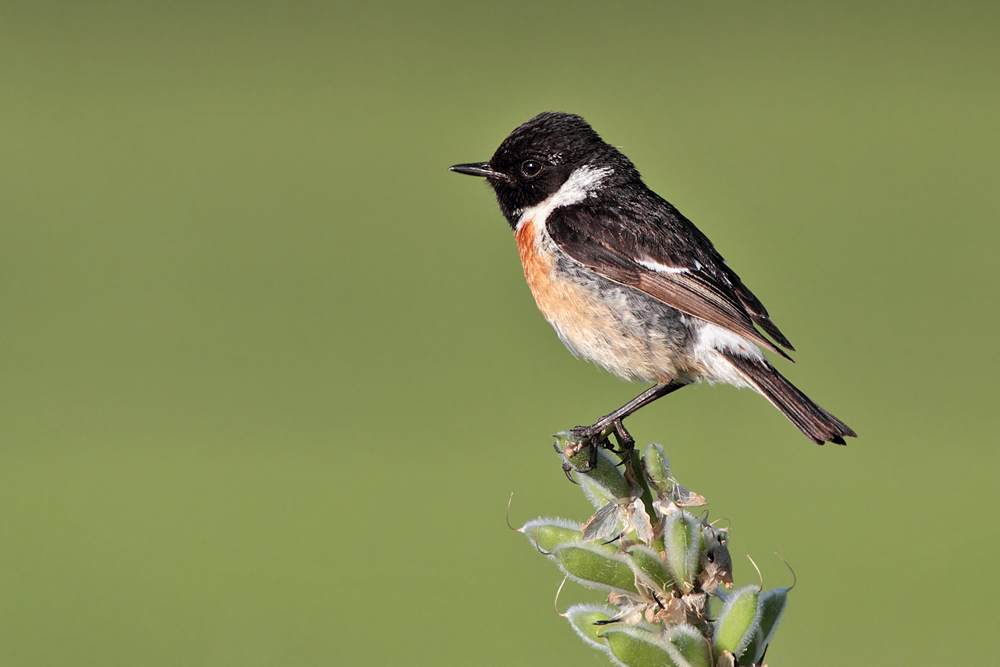 Schwarzkehlchen in der Nähe des Ilkerbruchs